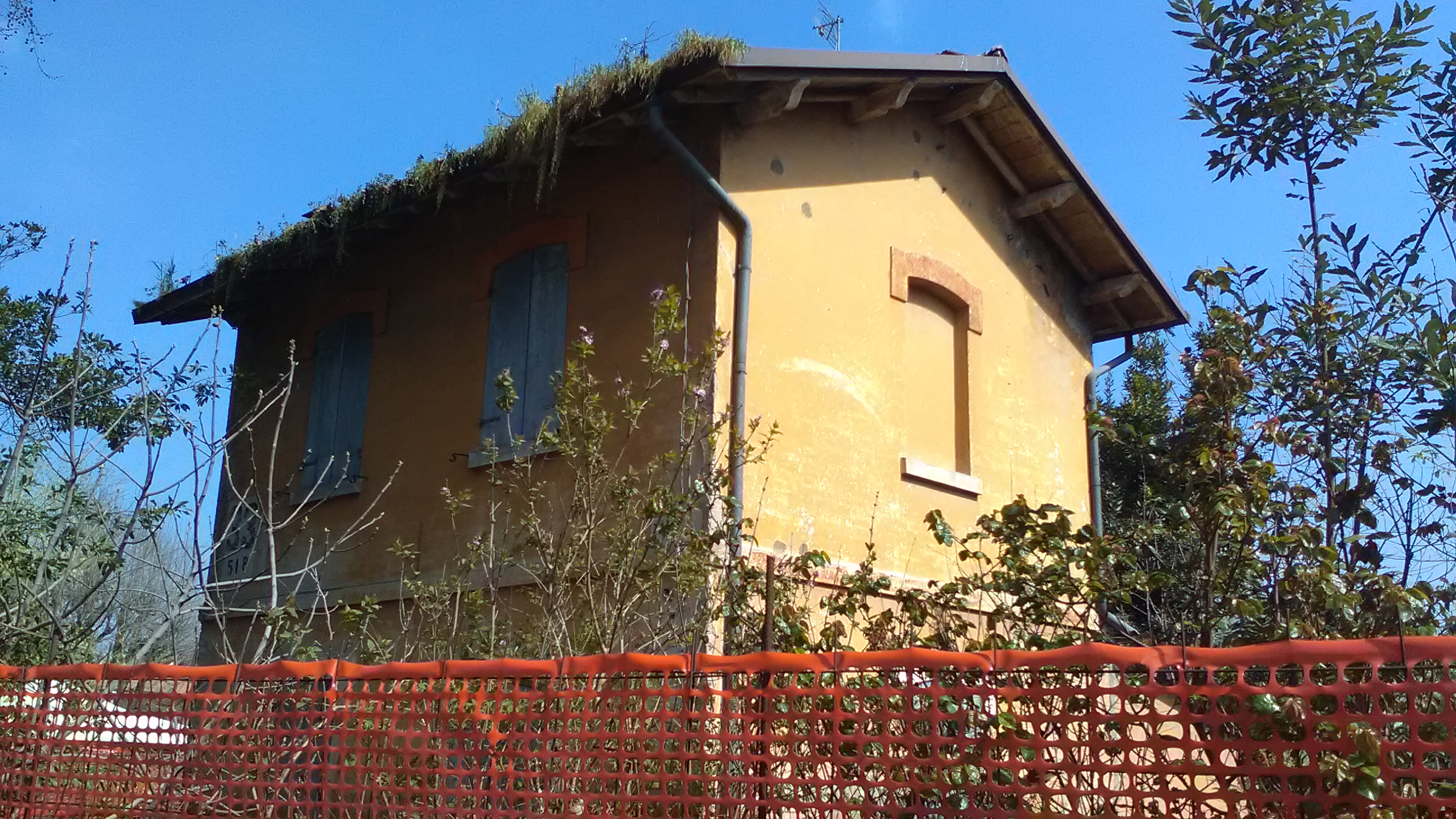 Ex casello della ferrovia incompiuta Mirandola-Rolo, situato a Mirandola in Via Cinque Martiri angolo via Eugenio Curiel